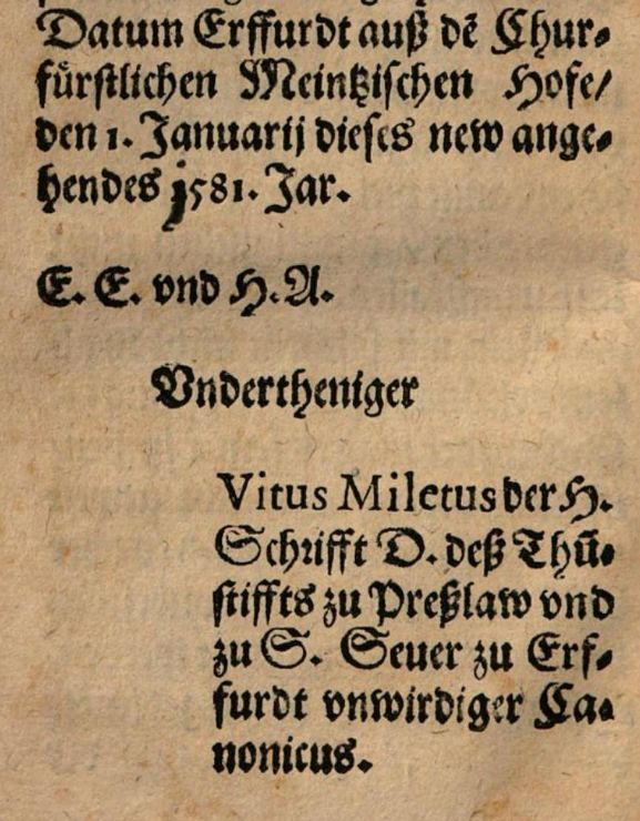 Ende der Vorrede von Catholischer Spiegel